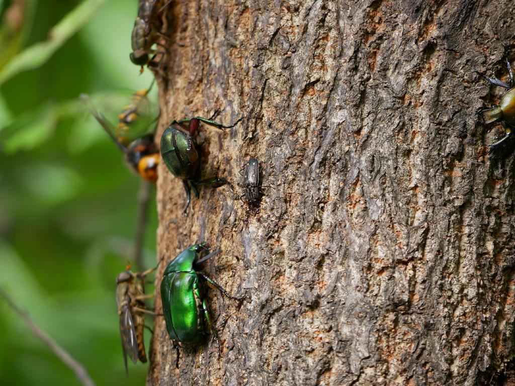 2019/08/01 和歌山県田辺市：Tanabe City. Wakayama Pref. Japan